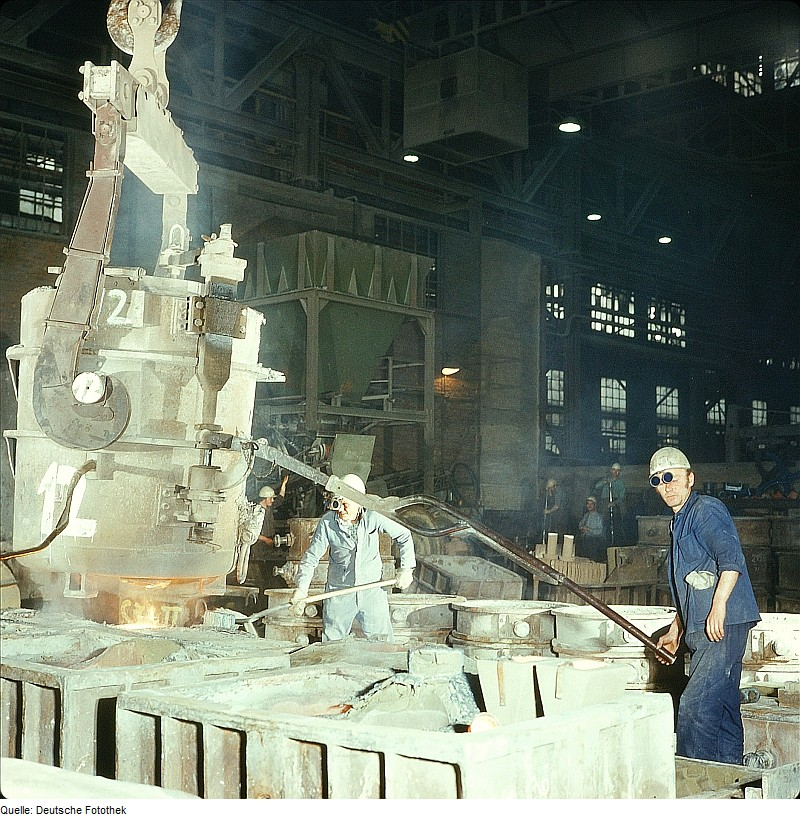 Original image description from the Deutsche Fotothek Facharbeiter für Gießereitechnik